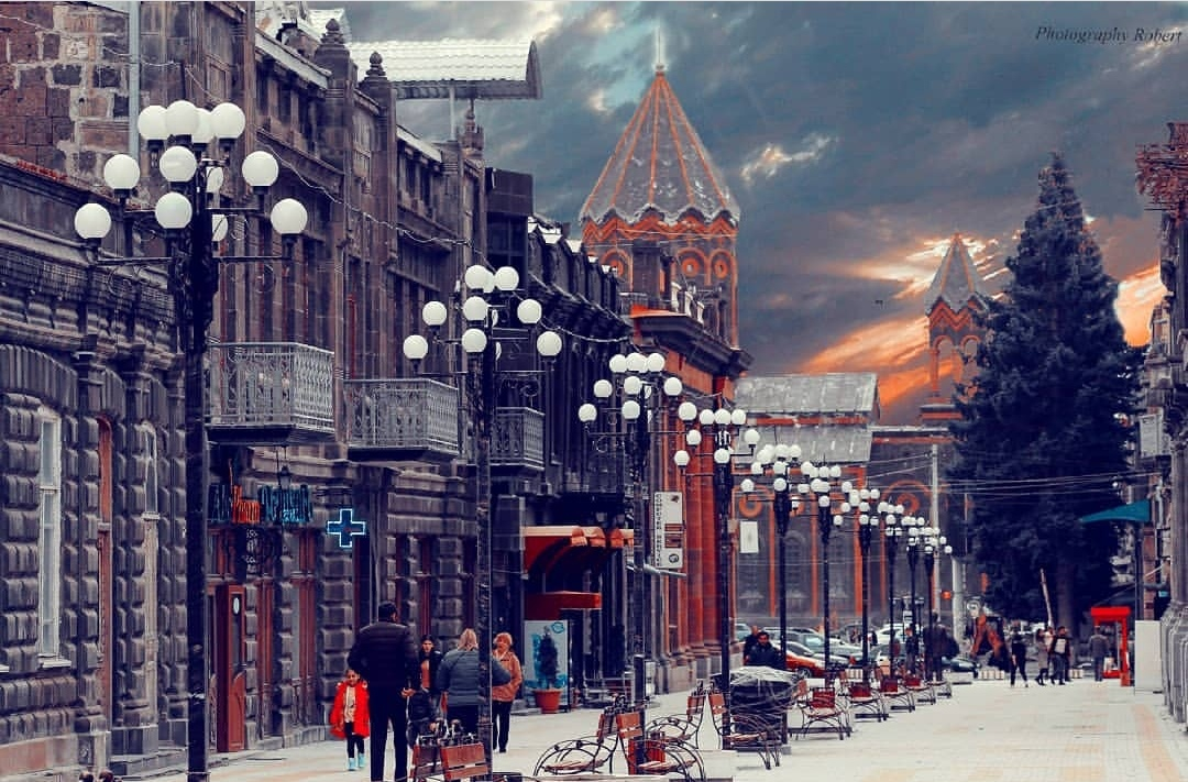 Renovigita strato de Gymri